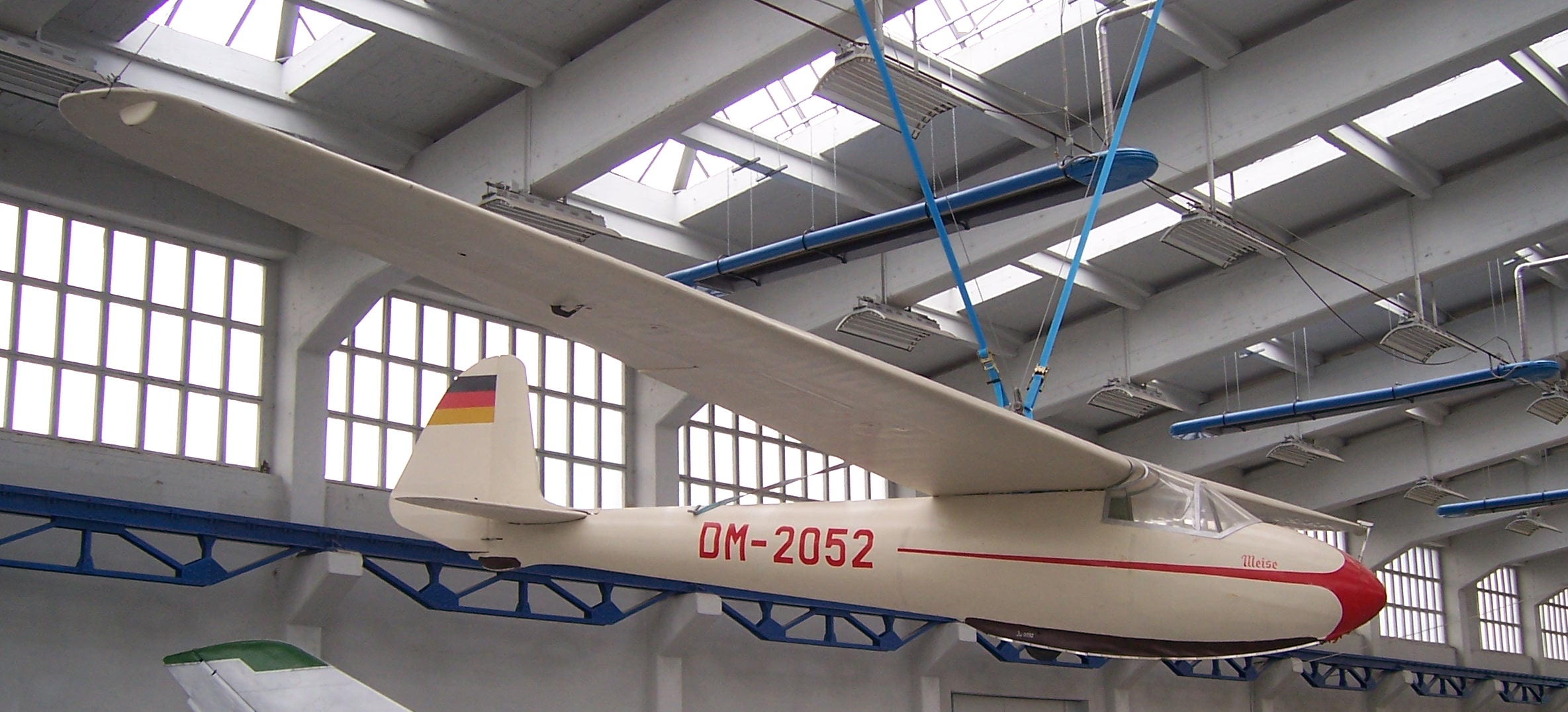 DFS Olympia Meise im Technikmuseum Hugo Junkers Dessau